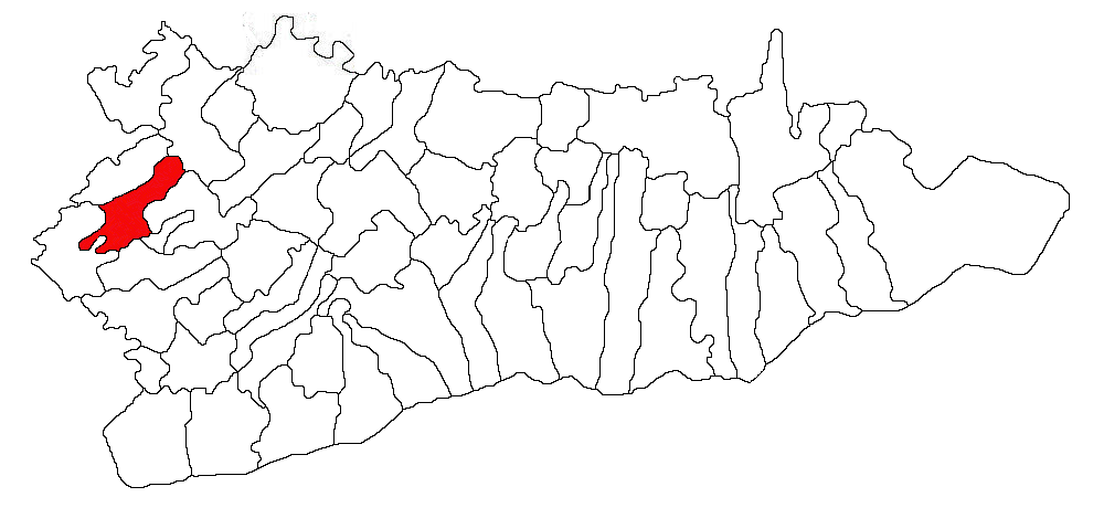 Categorie:Hărţi ale judeţului Călăraşi